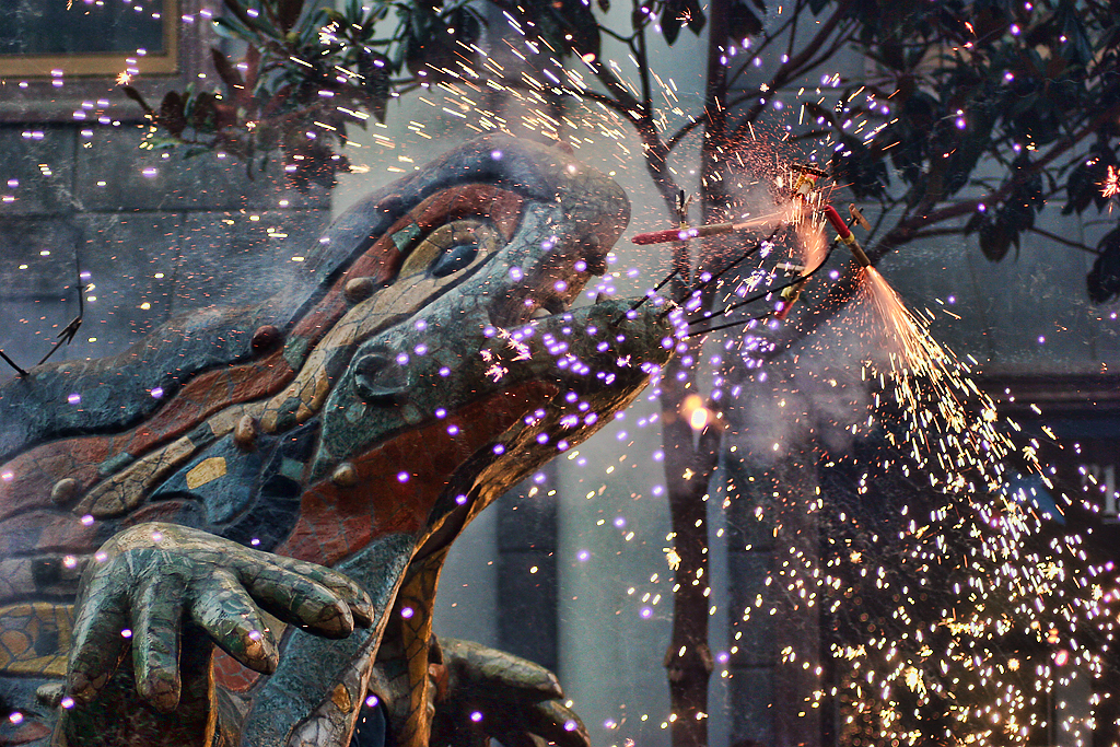 Festes de Gracia 2011